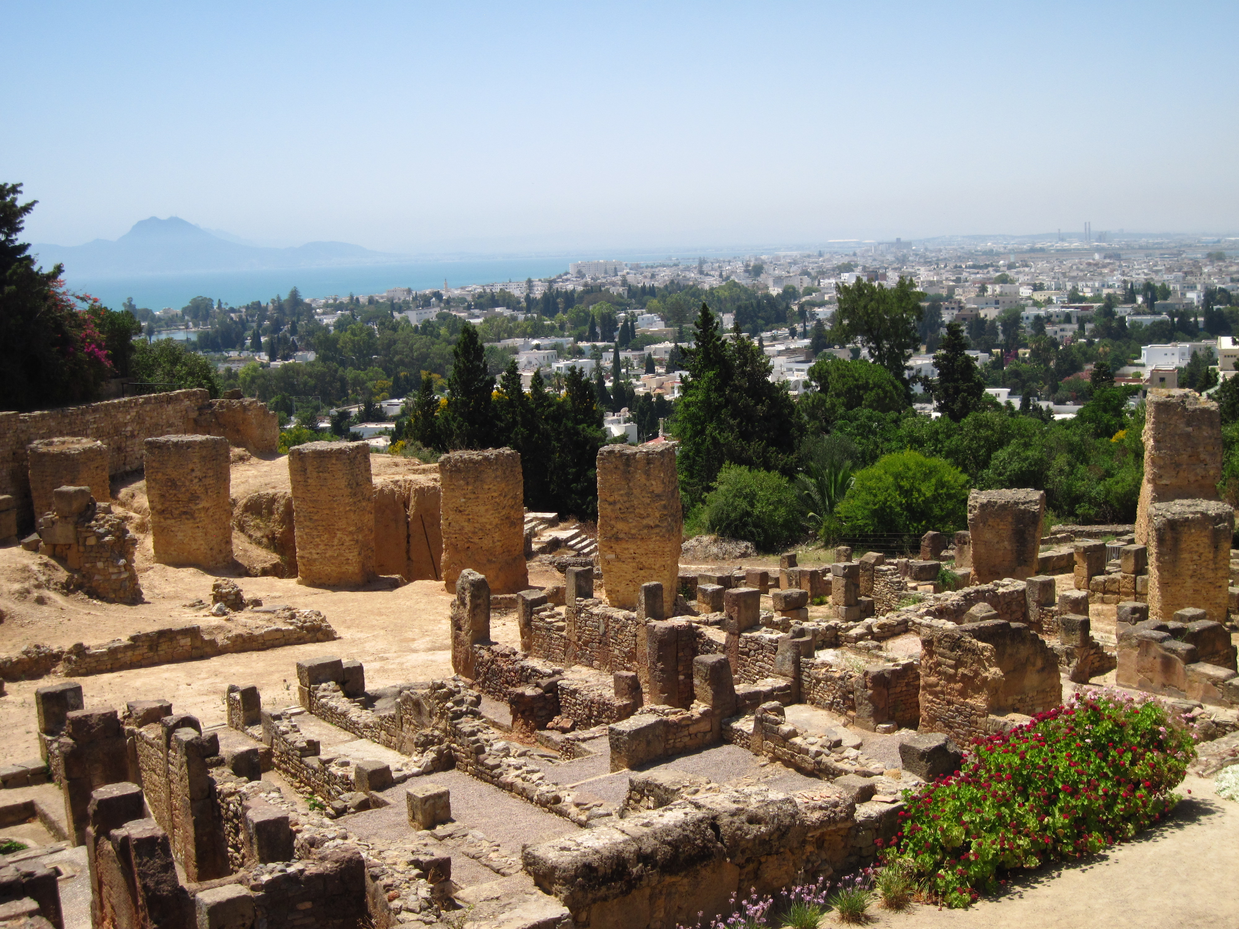 Ruines de Byrsa à Carthage